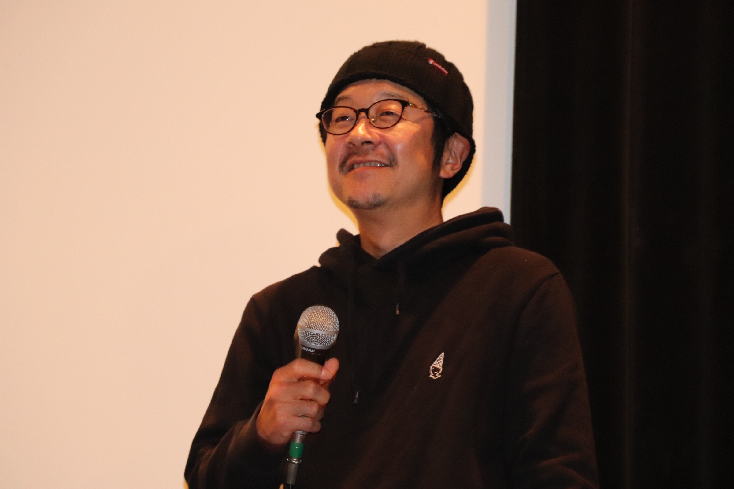 上野オークラ劇場『発情物語』舞台挨拶